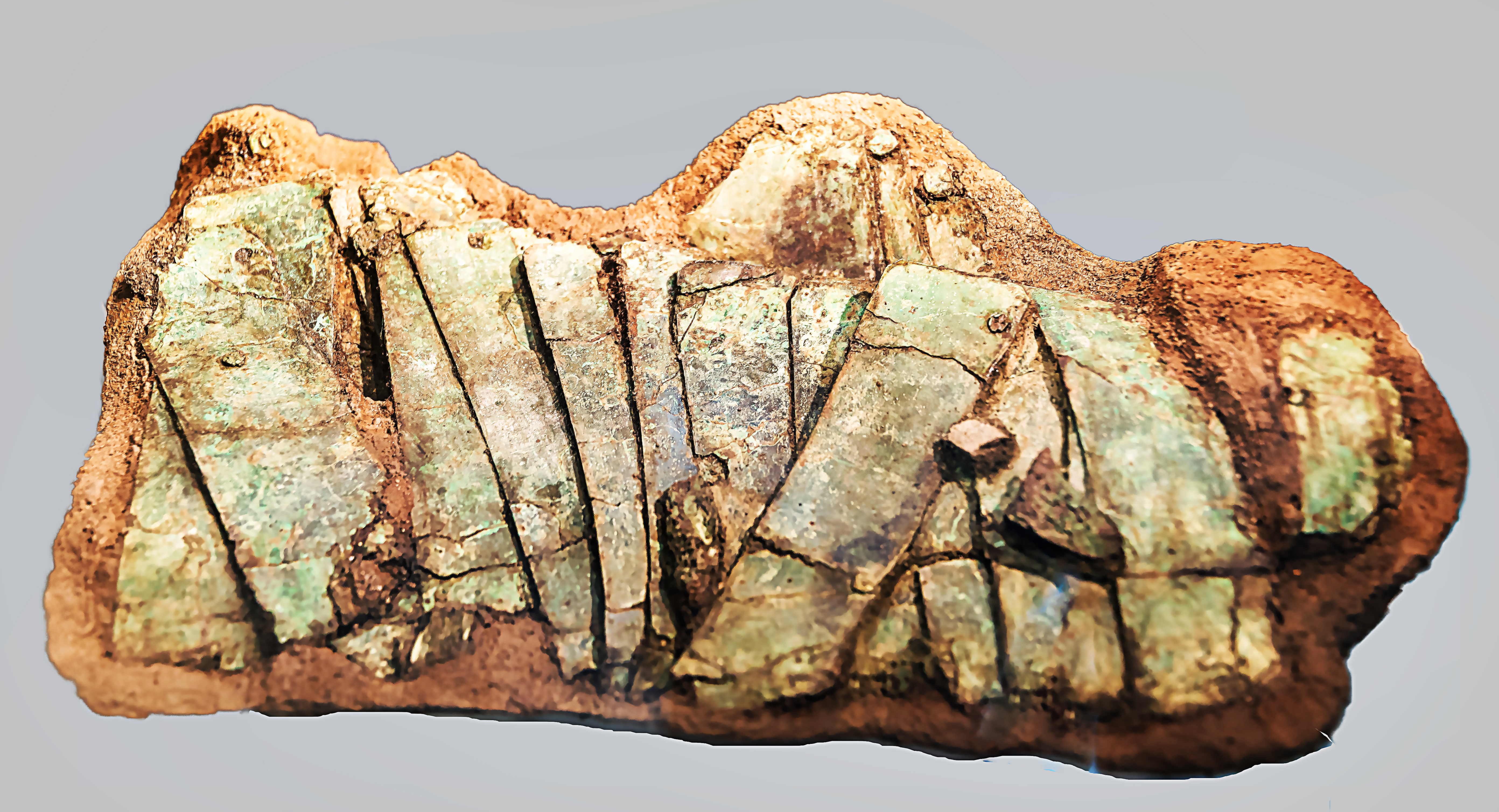 Fragment (Vorderseite) eines römischen Schienenarmschutzes (manica), der bei Xanten am Standort des Kastells Till-Steincheshof in den Jahren 2010/2011 ausgegraben wurde. Der aus 21 Messingschienen bestehende Armpanzer wird in die Zeit um die Wende vom 1. (letztes Drittel) zum 2. Jahrhundert (erstes Drittel) datiert. Der seltene, archäologisch bedeutende Fund befindet sich in Privatbesitz und wird im LVR - Römer Museum Xanten ausgestellt.